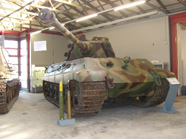 Königstiger im Panzermuseum Munster